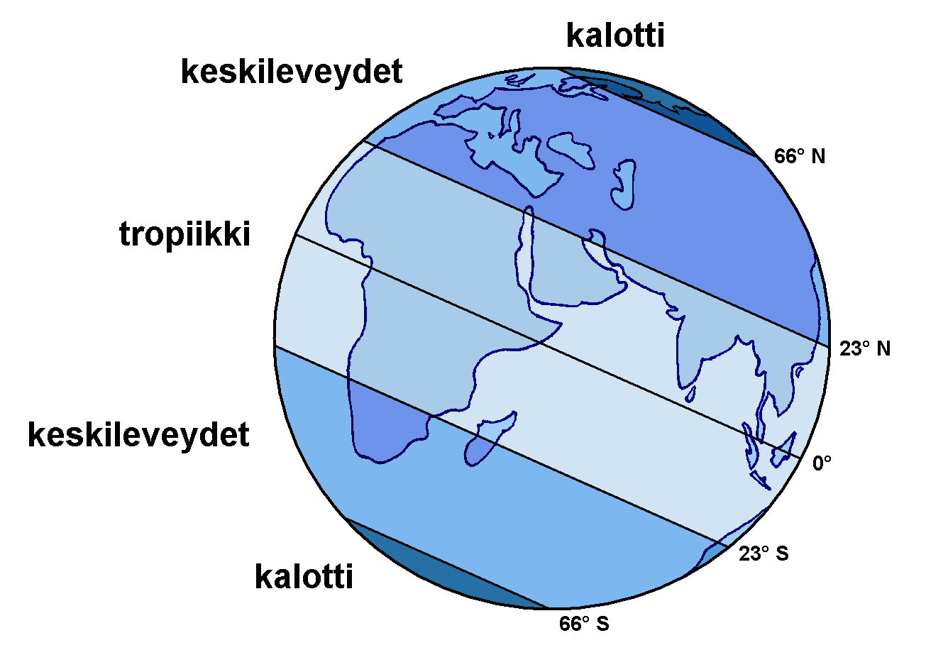 valaistusvyöhykkeet